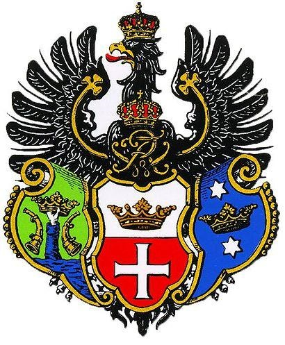 исторический герб Кёнигсберга из нем. Википедии